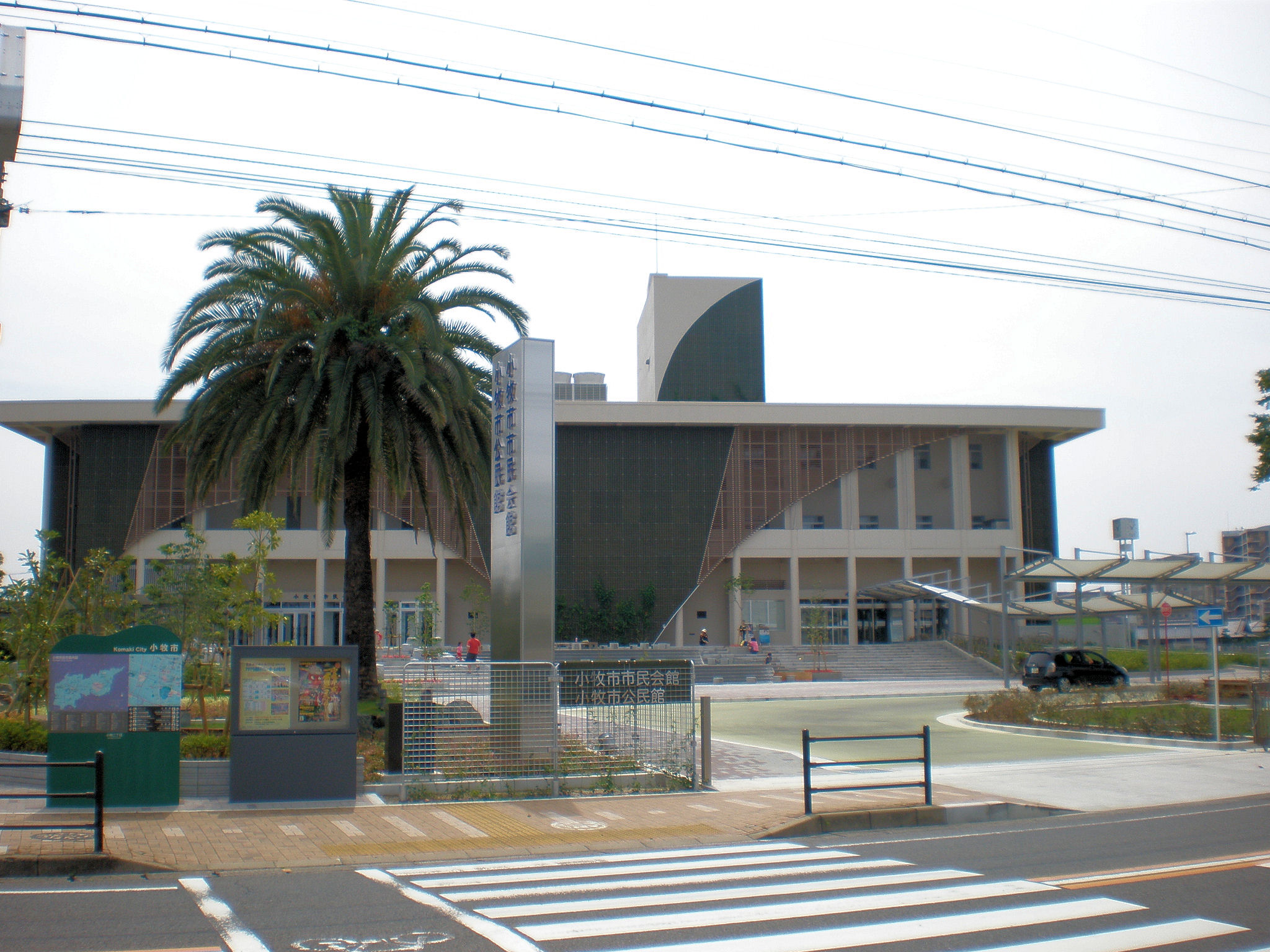 愛知県小牧市にある小牧市民会館・公民館